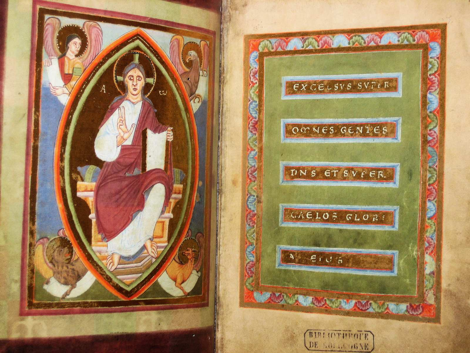 2 vun deenen éischt Säite vum Iechternacher Evangelistar, ëm 1030 (Facsimile).